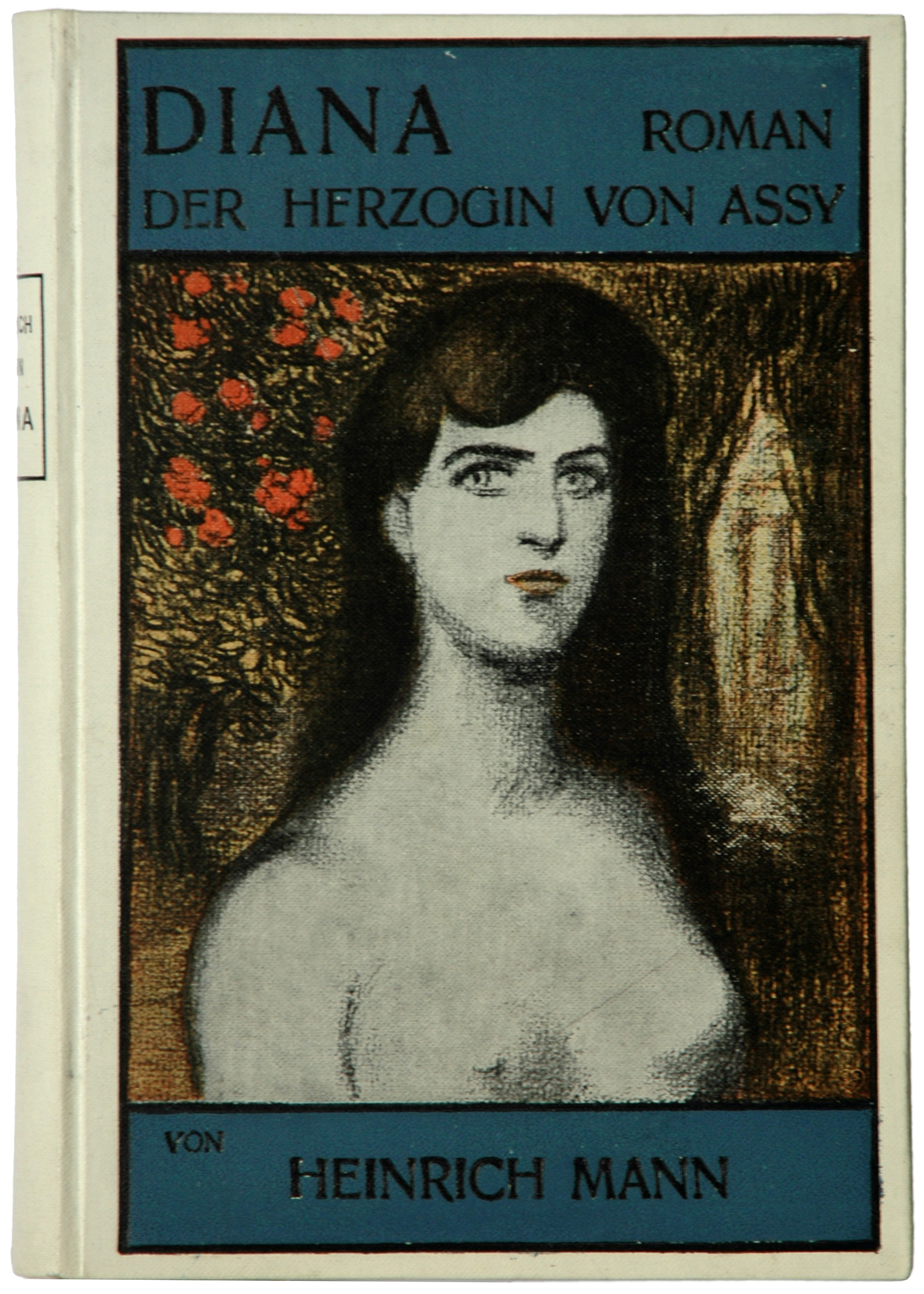 Mann, Heinrich: Die Göttinnen oder die drei Romane der Herzogin von Assy. München: Langen 1903, Bd. I: Diana 340 S., Erstausgabe. Das Frauenbildnis auf dem vorderen Buchdeckel (Einbandgestaltung) ist anonym. Ob es sich dabei um ein Porträt handelt, bleibt offen. Der Buchgestalter konnte nicht ermittelt werden. Er signiert rechts unten mit B. S. C., gerahmt von einem Herz 4 x 4 mm. In der Heinrich Mann-Bibliographie von Edith Zenker (1967) wird der Buchgestalter der Erstausgabe nicht erwähnt.